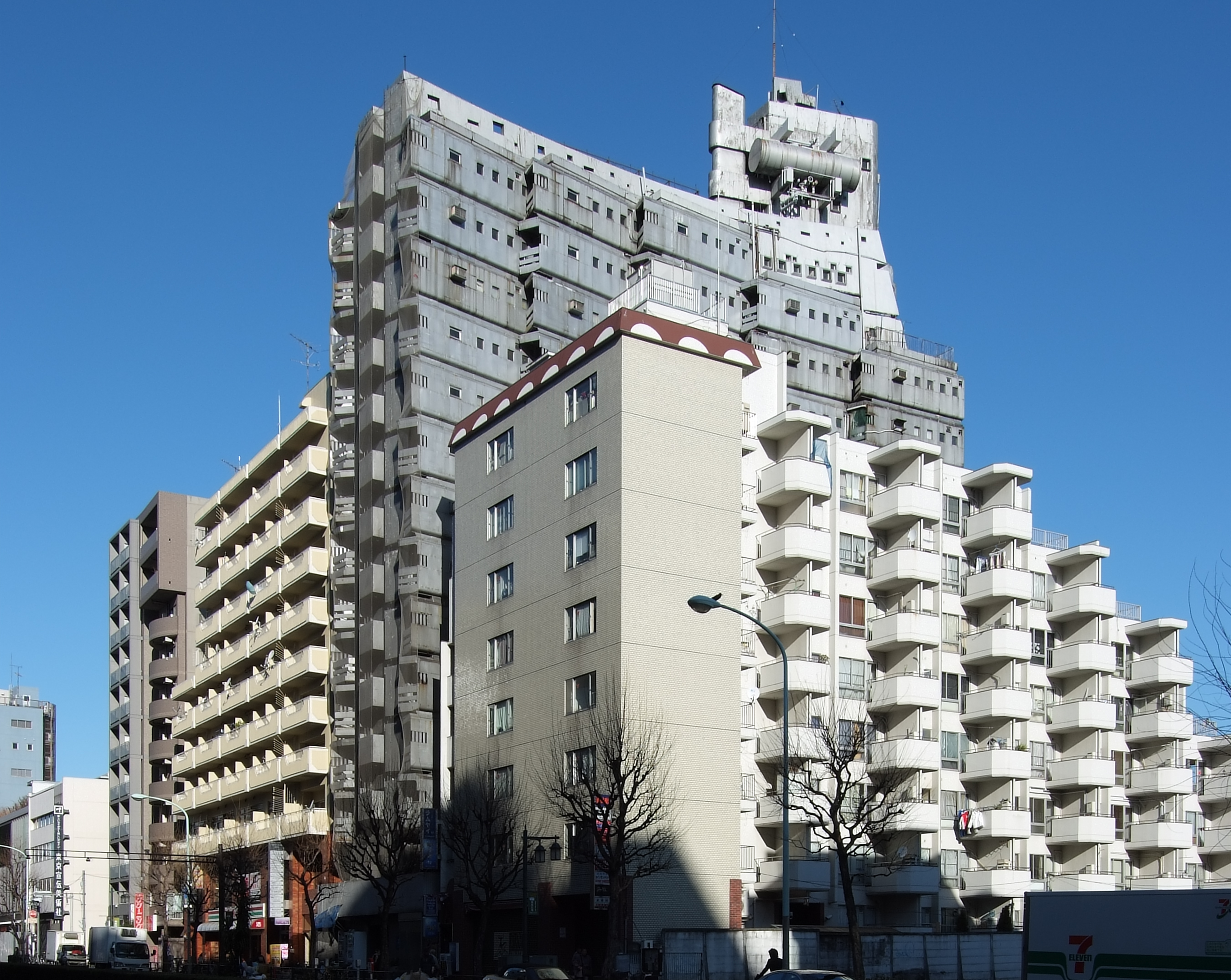 New Sky Building #3, at Shinjyuku-ku Tokyo Japan, design by Yoji Watanabe.